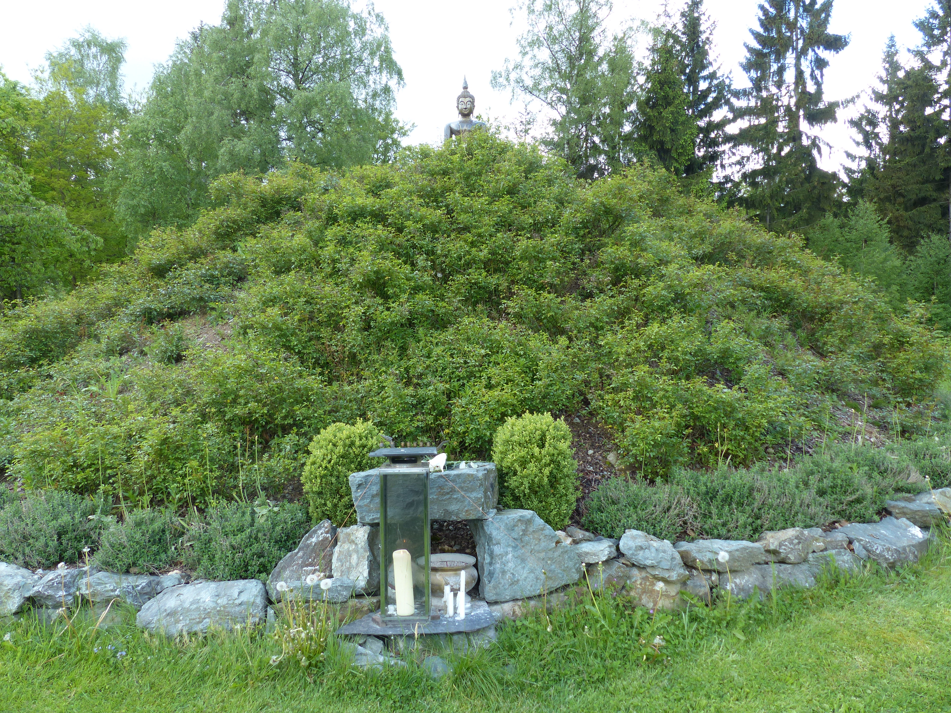 Waldkloster Muttodaya, Ortsteil Herrnschrot, Stammbach